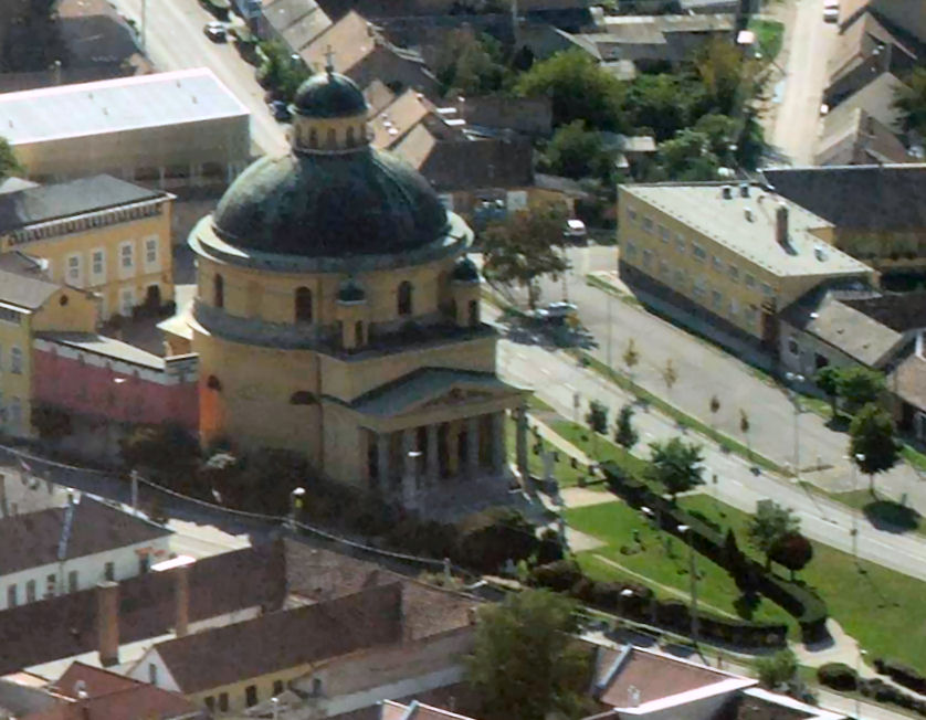 A Kerektemplom légifotója